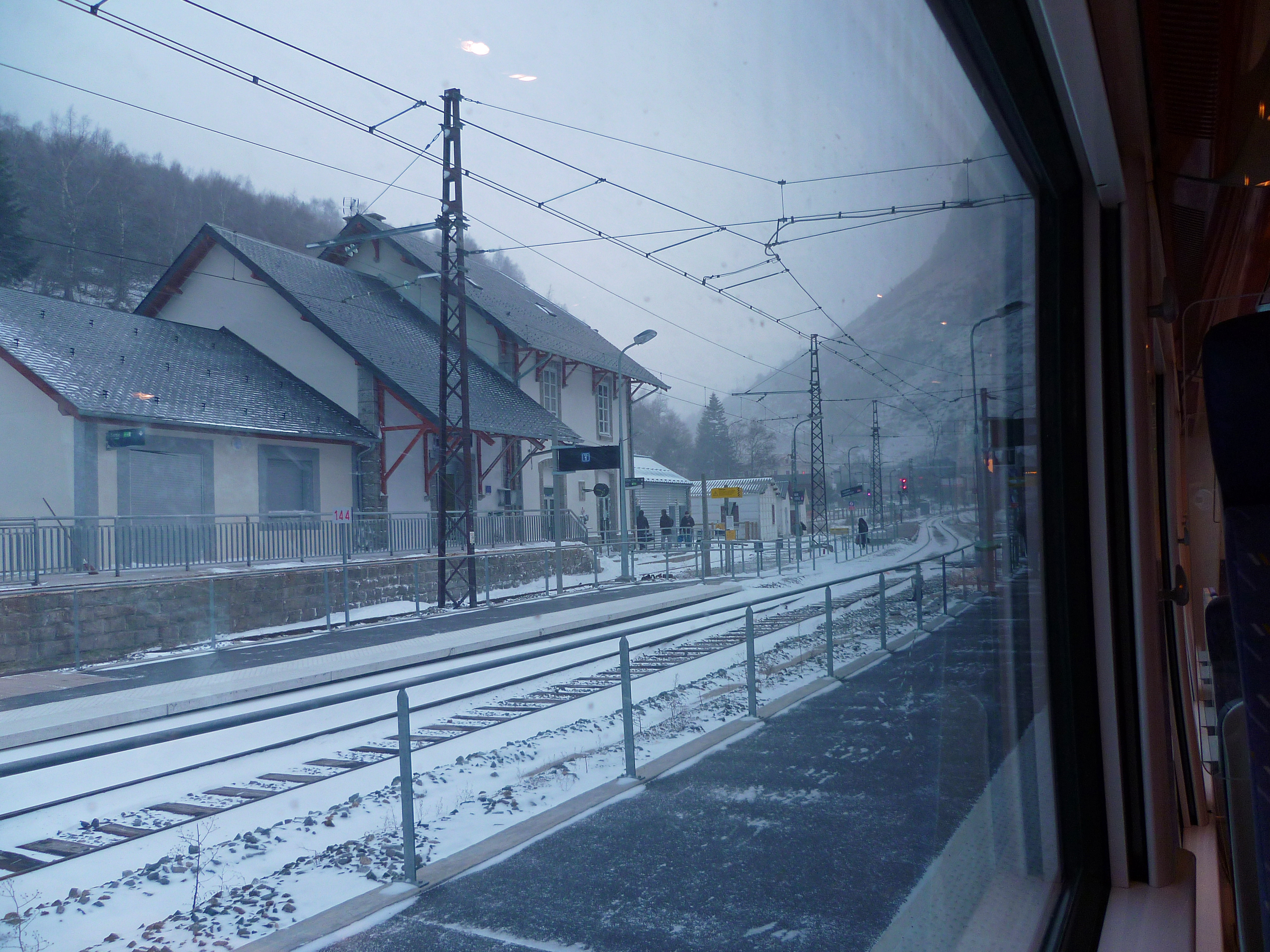 L'Hospitalet-près-l'Andorre : La gare vue du train.